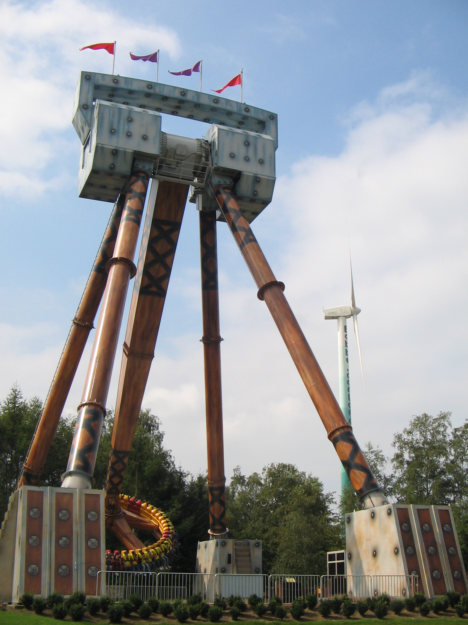 Kreisende Schiffsschaukel im Bobbejaanland